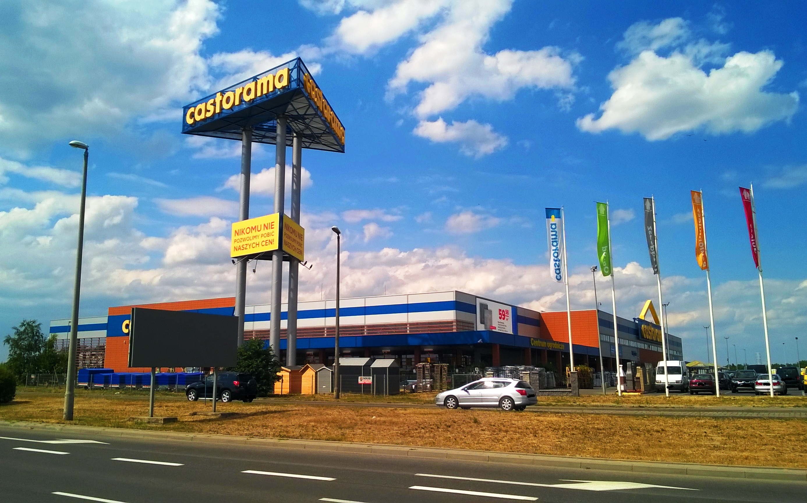 Castorama w Toruniu11